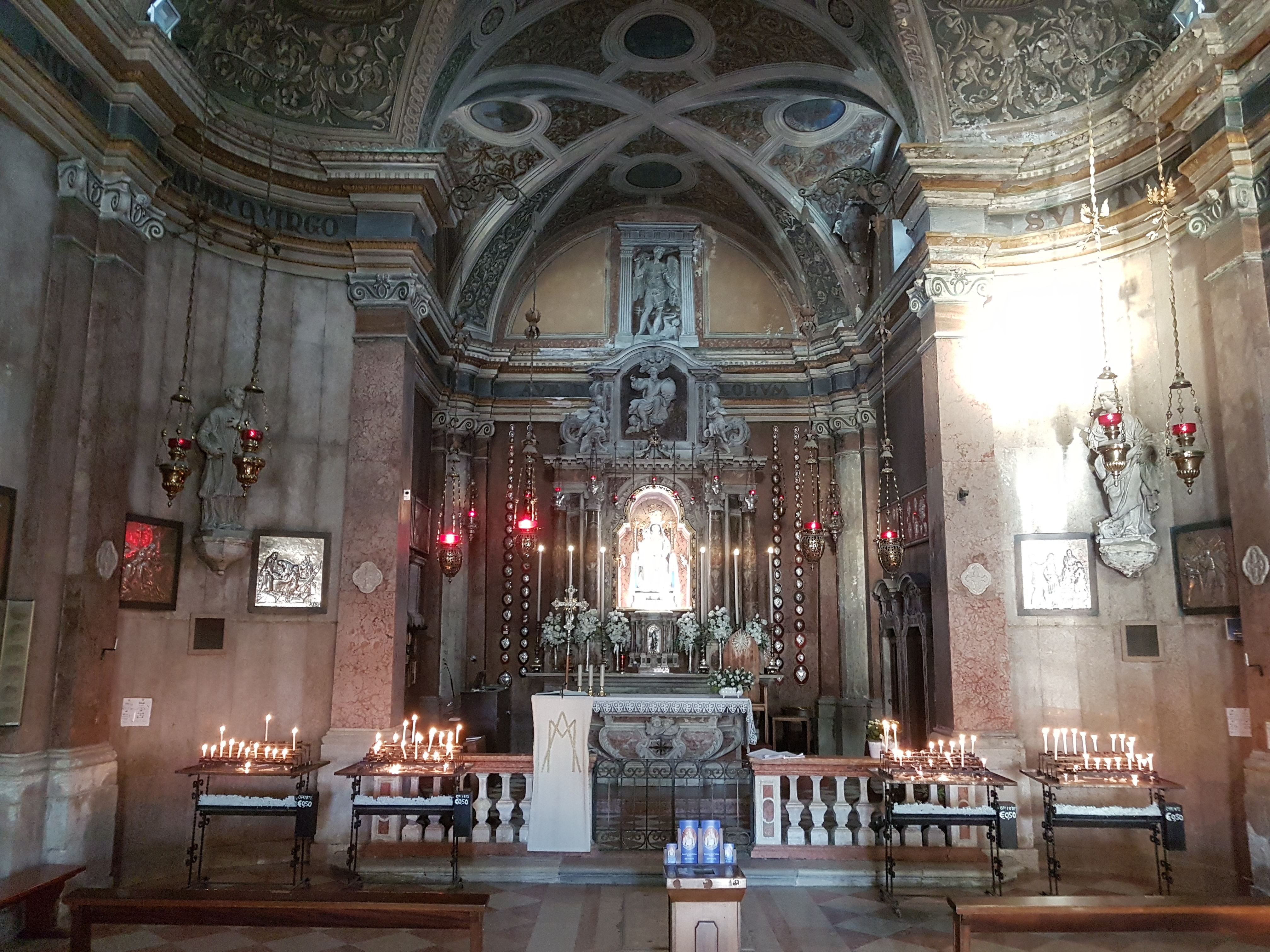 Santuario della Madonna dell'Angelo (Caorle)